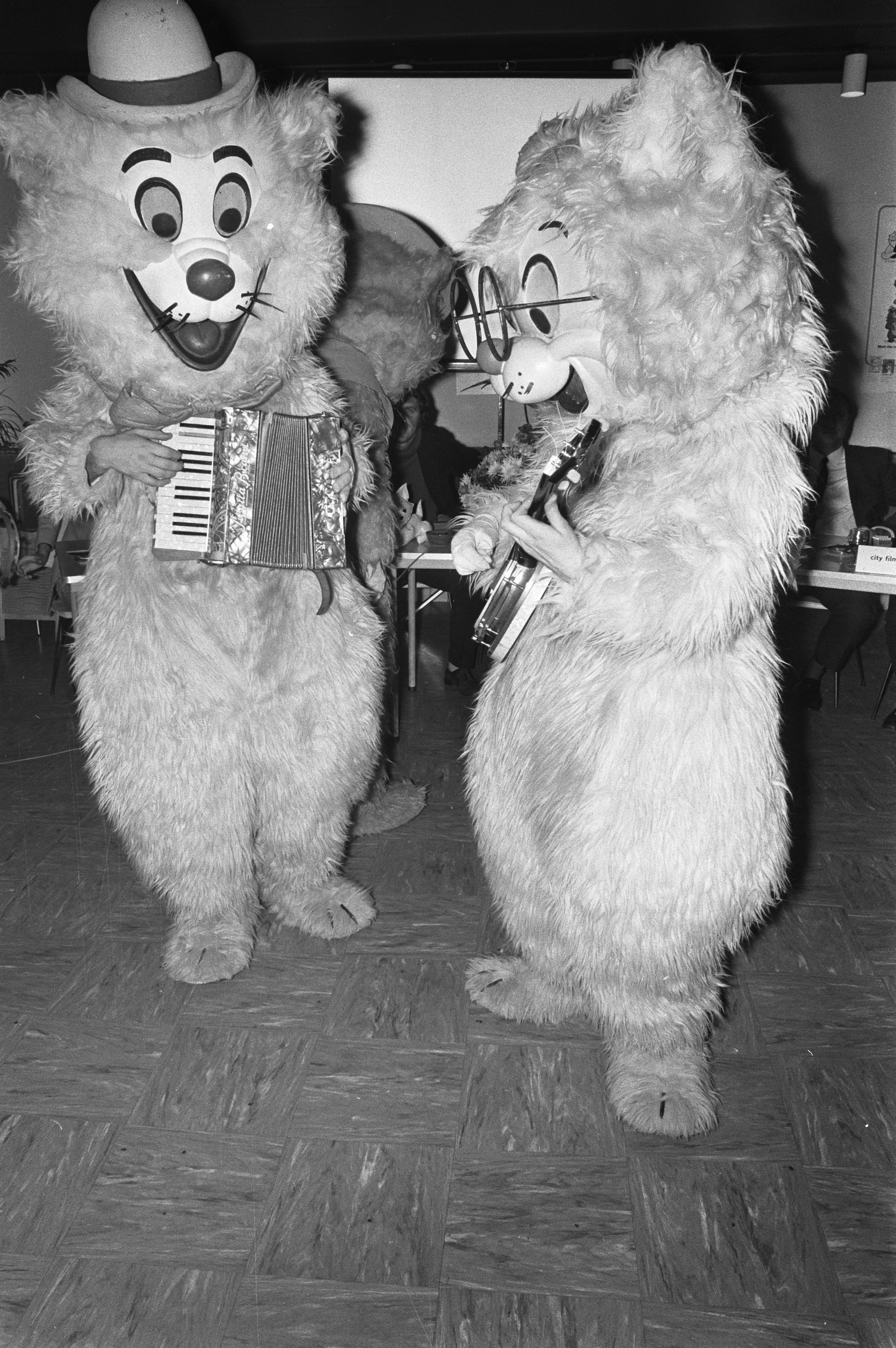 Collectie / Archief : Fotocollectie Anefo Reportage / Serie : [ onbekend ] Beschrijving : Aristocats, figuren uit Disneyfilm in Bijenkorf, Amsterdam Aristocats Datum : 18 november 1971 Locatie : Amsterdam, Noord-Holland Trefwoorden : FIGUREN, muziek Persoonsnaam : Aristocats Fotograaf : Croes, Rob C. / Anefo Auteursrechthebbende : Nationaal Archief Materiaalsoort : Negatief (zwart/wit) Nummer archiefinventaris : bekijk toegang 2.24.01.05 Bestanddeelnummer : 925-1543